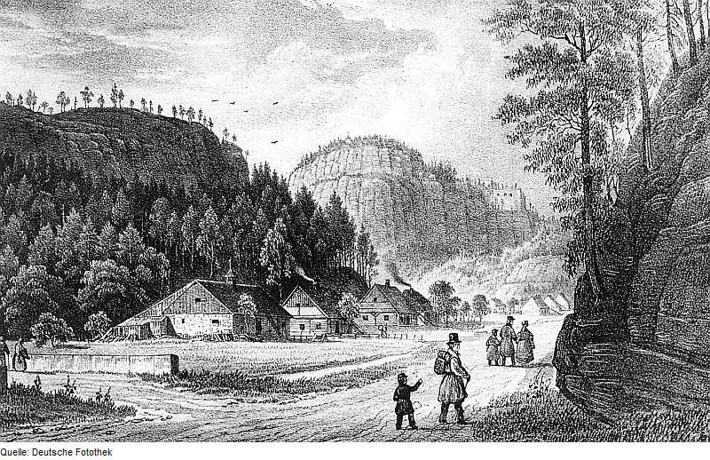 Original image description from the Deutsche Fotothek Oybin. Ortsansicht, Mitternachtsseite (Norden), aus: Der Qybin, zwölf malerische Ansichten von Dr. E. Sommer, hrsg. von Arlt, 1832 (Görlitz, Graph. Kabinett)